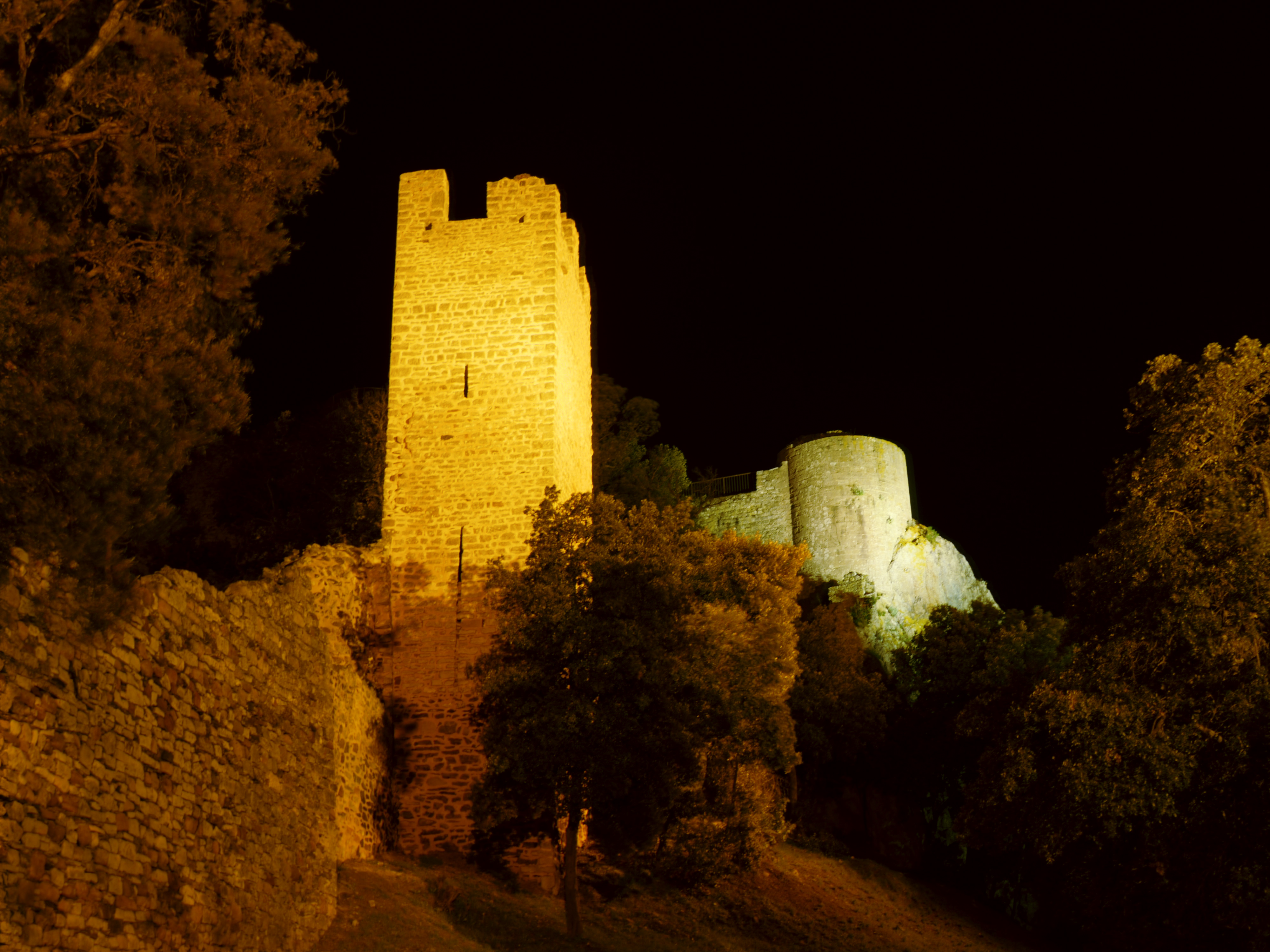 Le château d'Hyères illuminé